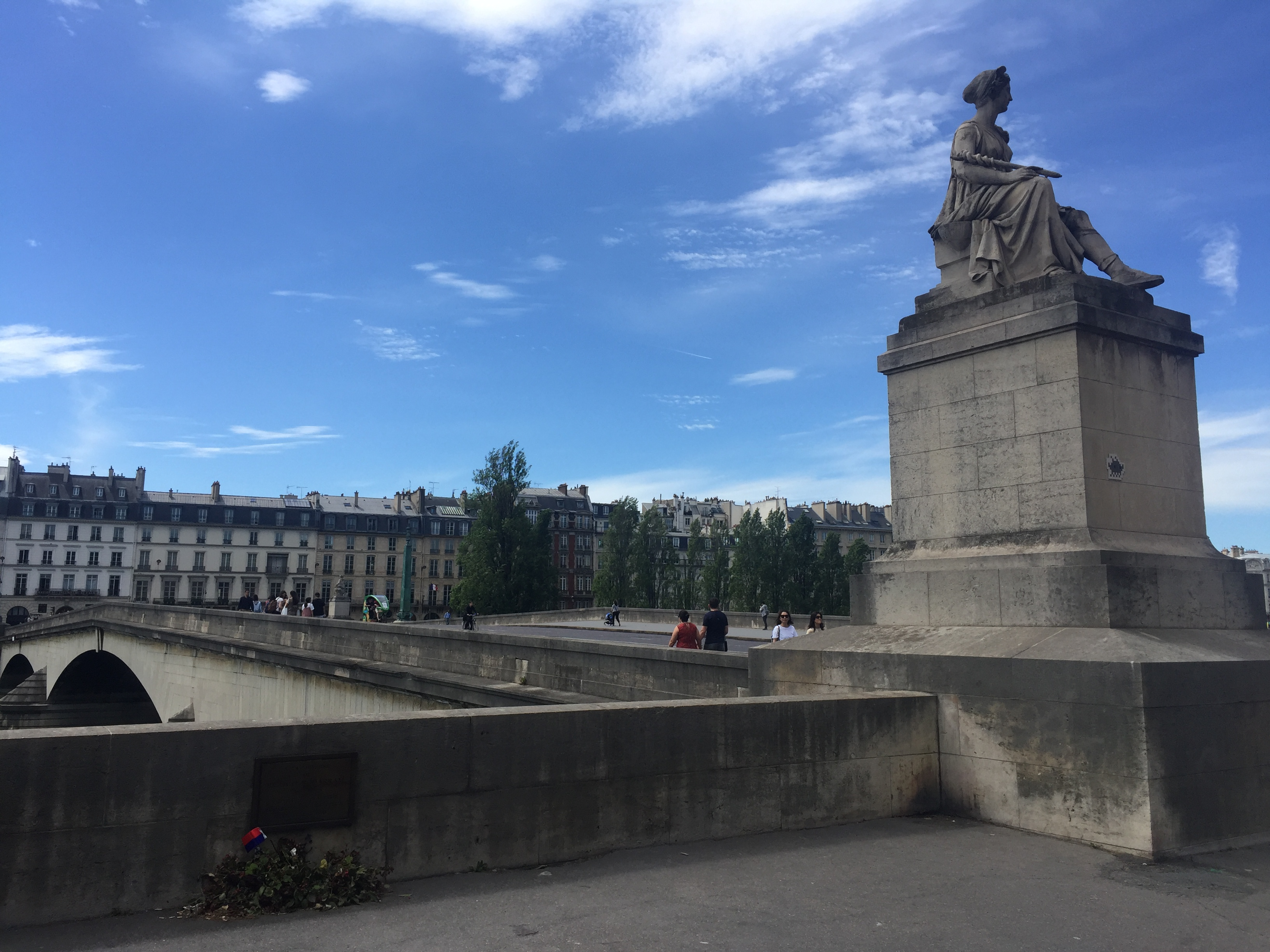 Plaque commémorative à l'Brahim Bouarram.